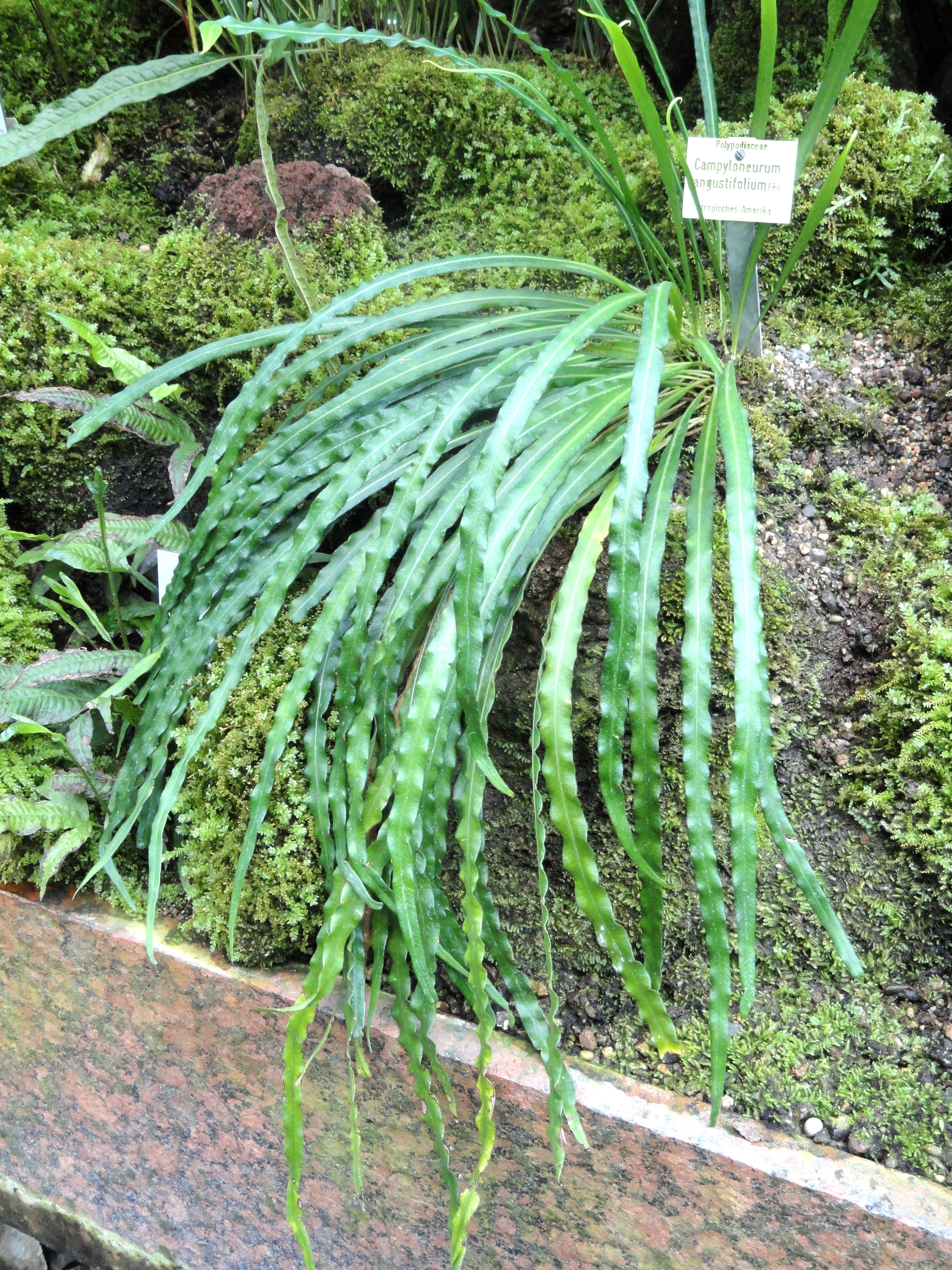 Campyloneurum angustifolium specimen in the Botanischer Garten München-Nymphenburg, Munich, Germany.